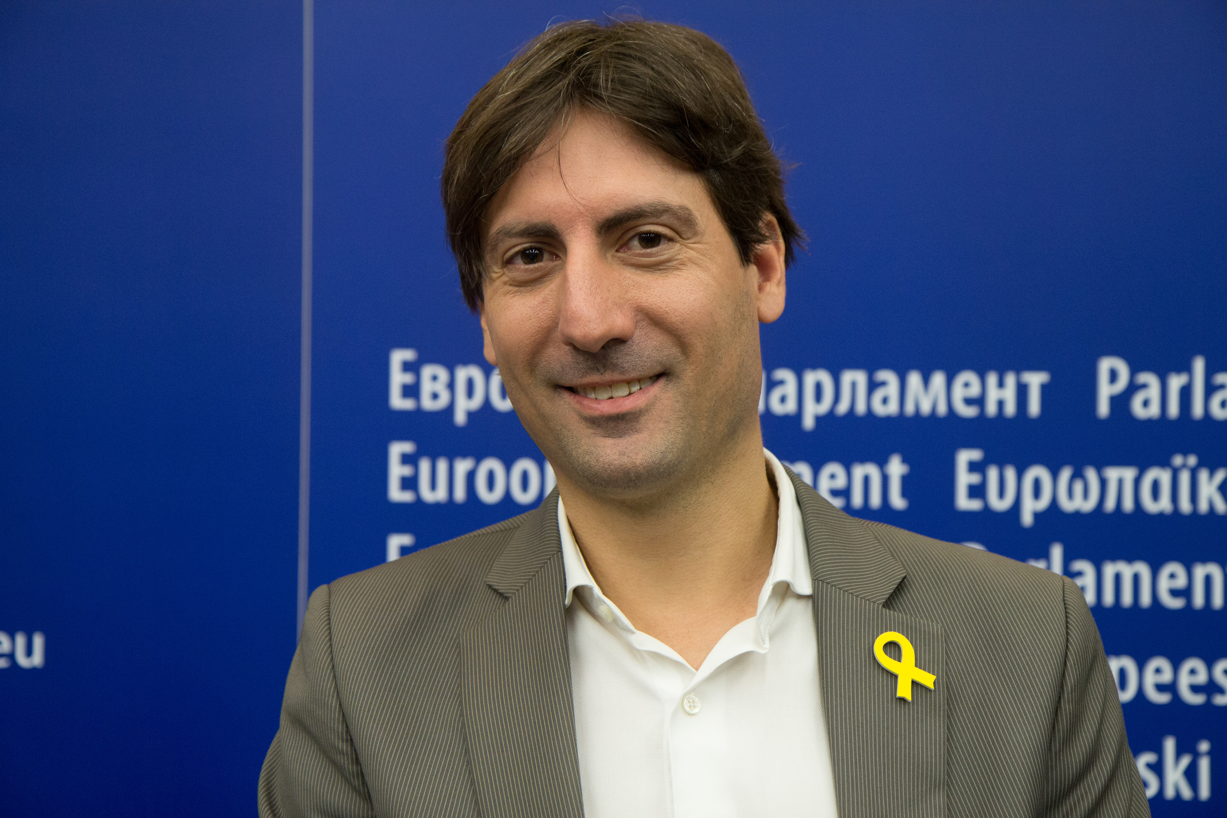 Sitzung des Europa Parlaments im Juli 2018 in Straßburg.